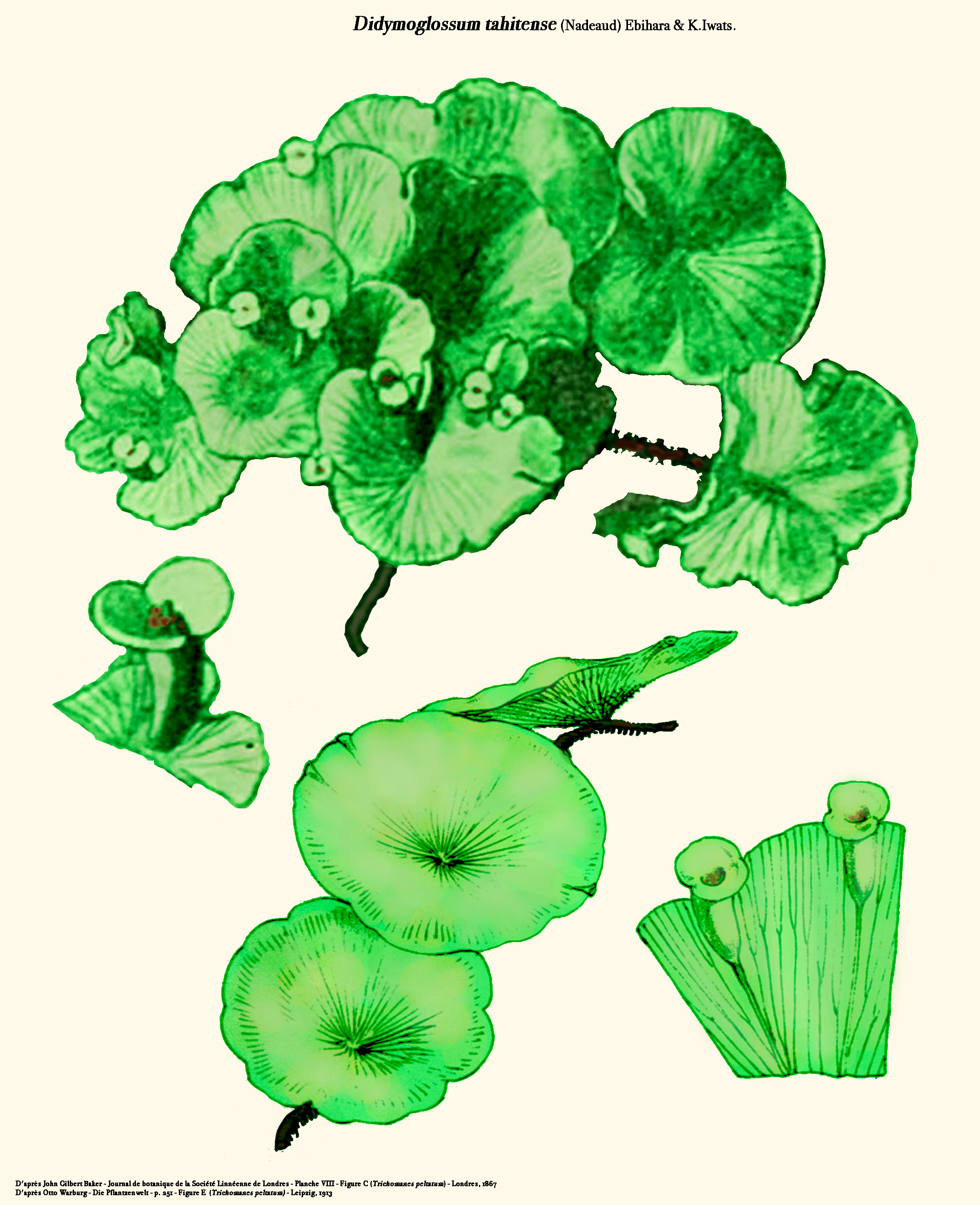 Didymoglossum tahitense - d'après John Gilbert Baker (Journal of the Linnean Society - 1867) et Otto Warburg (Die Pflantzenwelt - 1913) - Repris sous Gimp par D. Prévôt